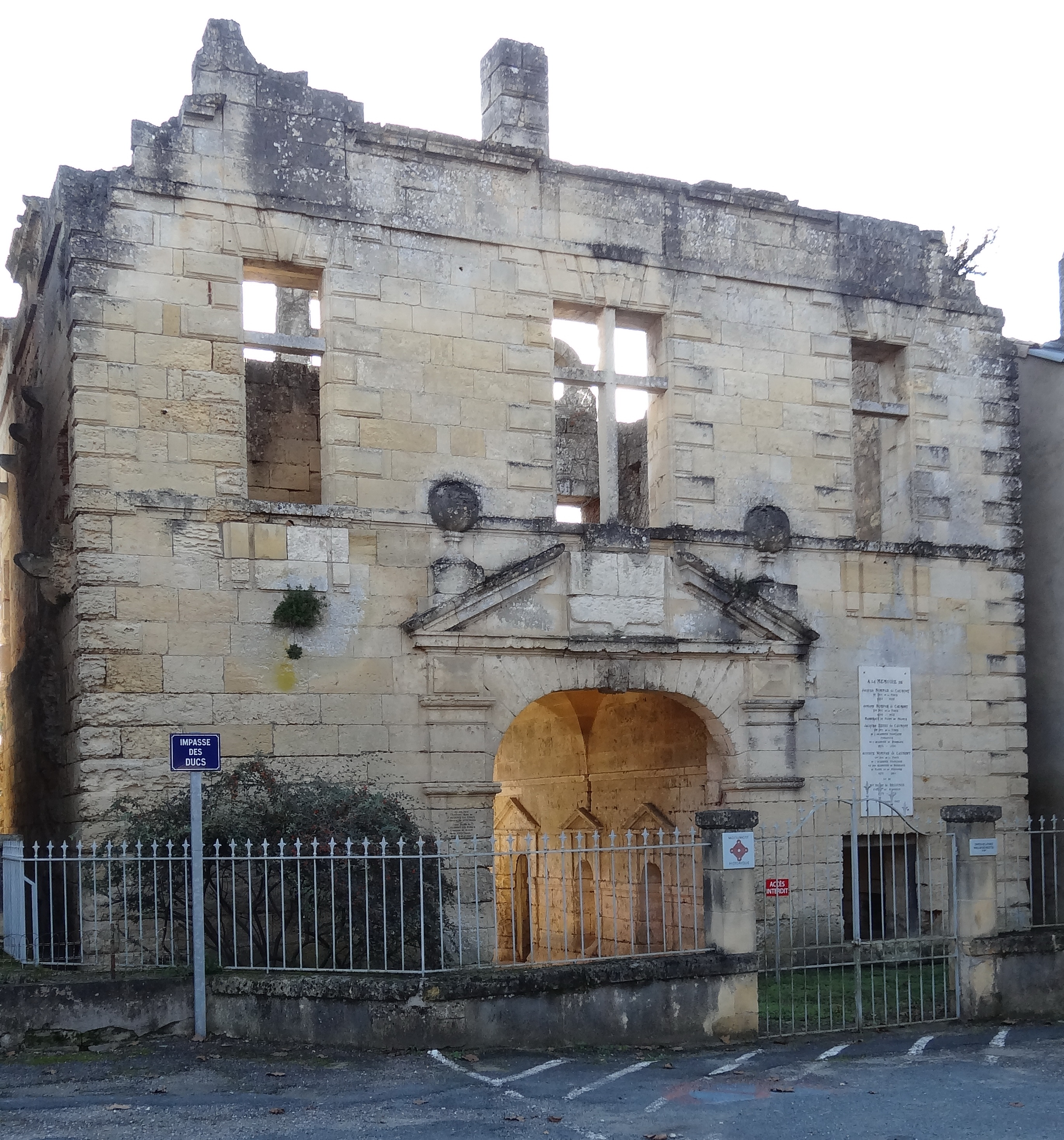 Château de La Force - Pavillon des recettes (Dordogne)